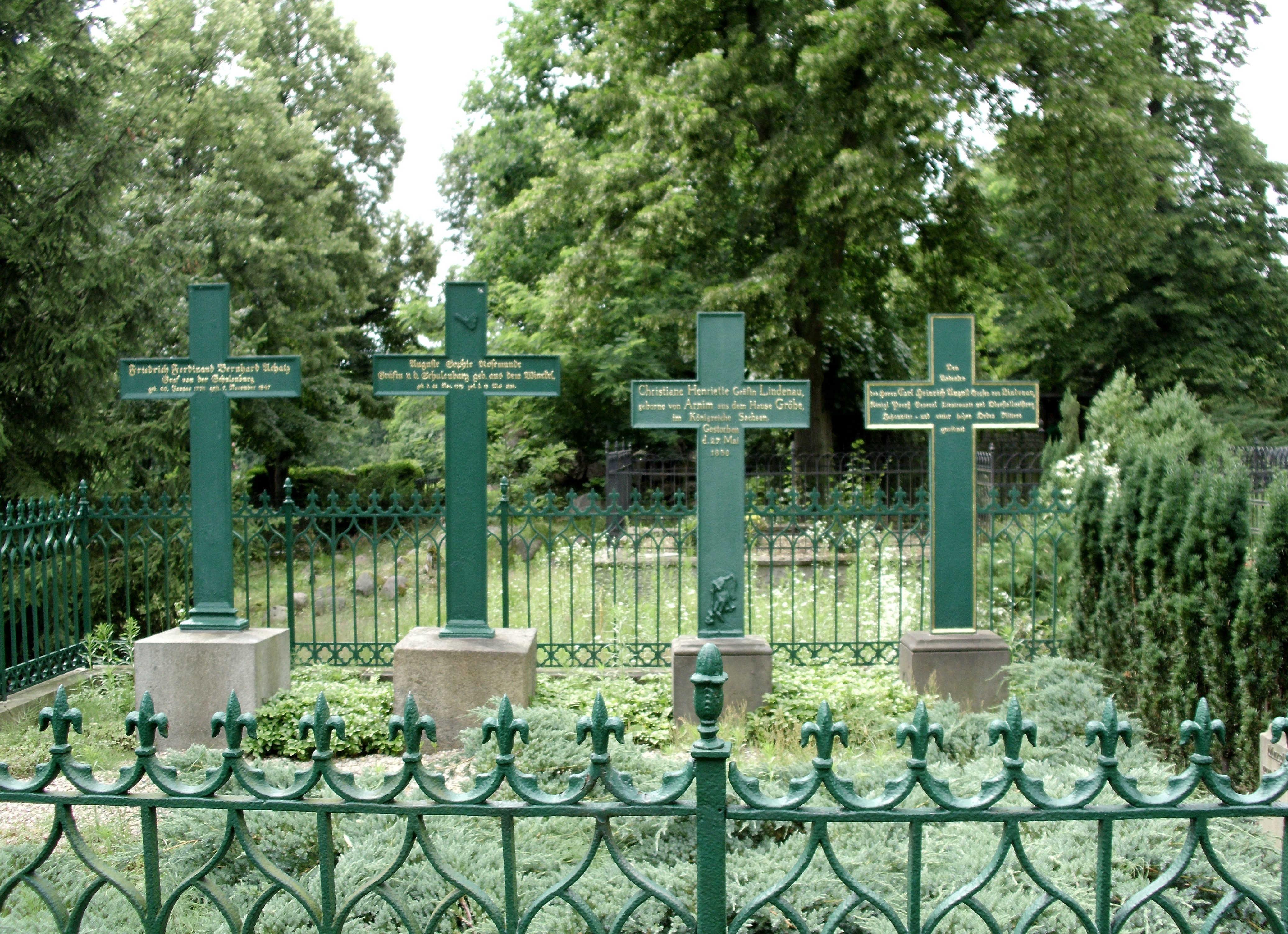 Grabstätte der Familie von Lindenau und der Familie von der Schulenburg, bestehend aus vier Grabkreuzen einschließlich Einfriedung der Begräbnisfläche, auf dem städtischen Friedhof von Lieberose, Brandenburg, Deutschland.